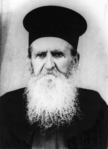 Hristos_Grigoriou